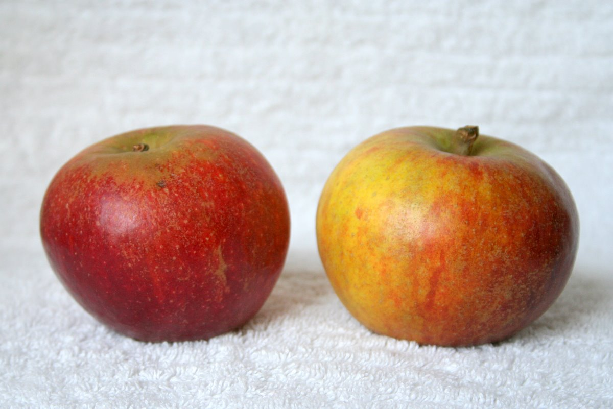 Cox Orange apples - Pommes Cox Orange